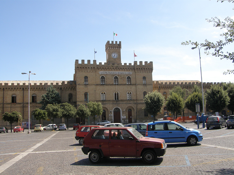 Chieti Caserma Spinuzzi